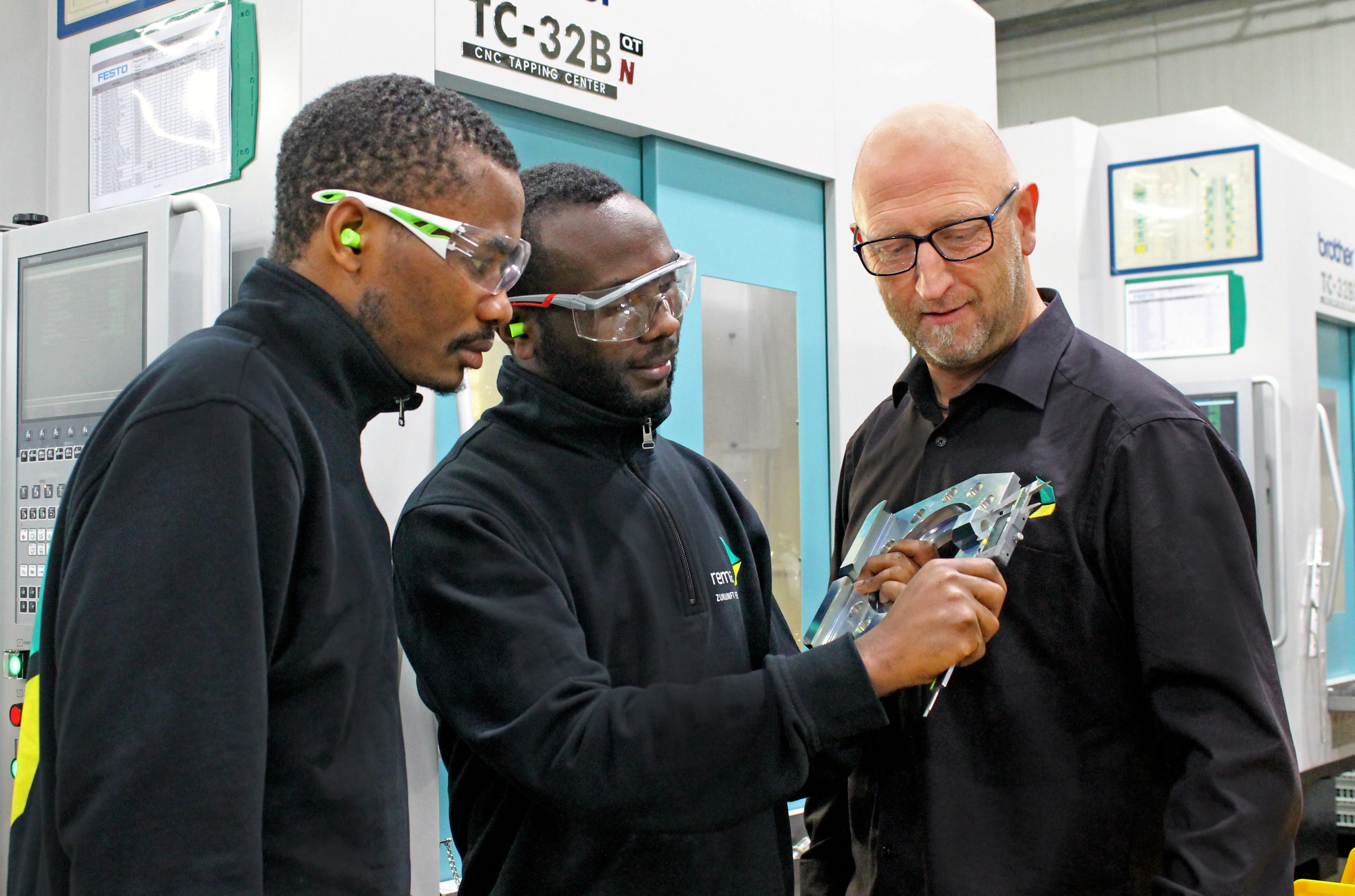 rechts: zweiter rema Geschäftsführer - Herr Mathias Uhl links: zwei Auszubildende aus dem ersten Ruanda-Ausbilddungsjahrgang